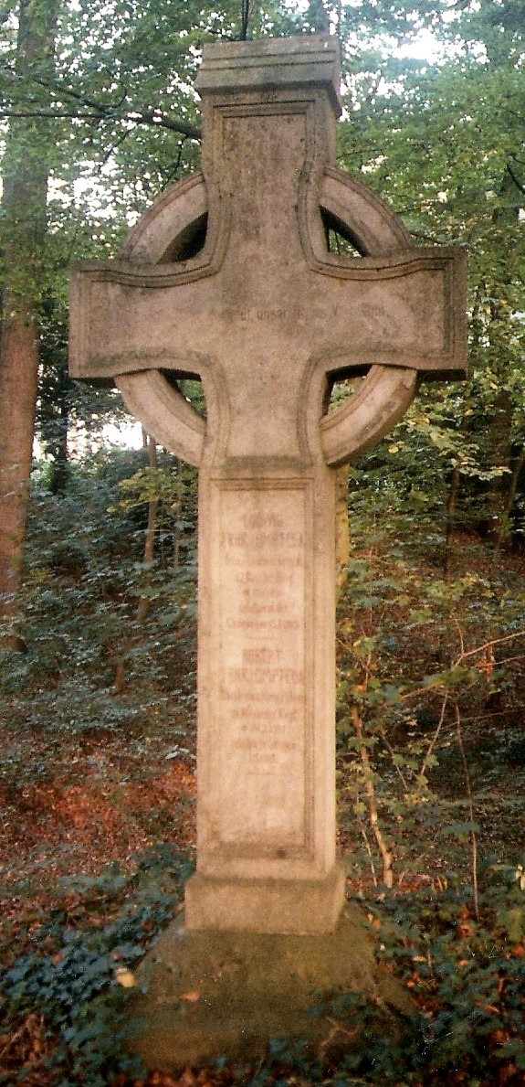 Ehrenmal